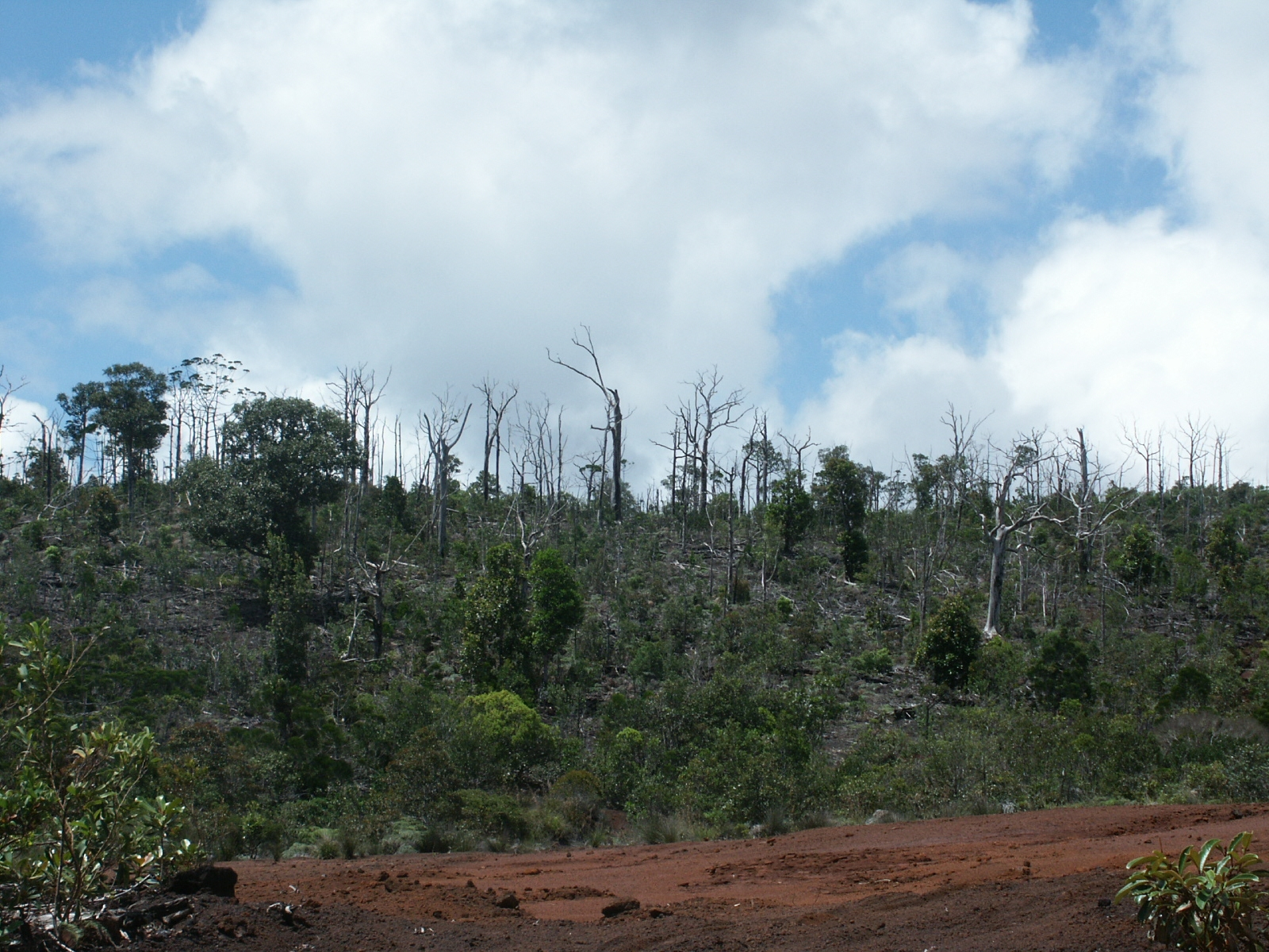 Forêt de chênes gomme (Arillastrum gummiferum) incendiée. L'incendie est ancien (plus de 15 ans au minimum). Les troncs sont bien conservés mais aucune repousse de chêne gomme n'existe alors que des Casuarinacées (Gymnostoma spp - probablement Gymnostoma deplancheanum) sont déjà grandes, malgré la lenteur normale de leur pousse. Proximité du col de Prony - Nouvelle-Calédonie